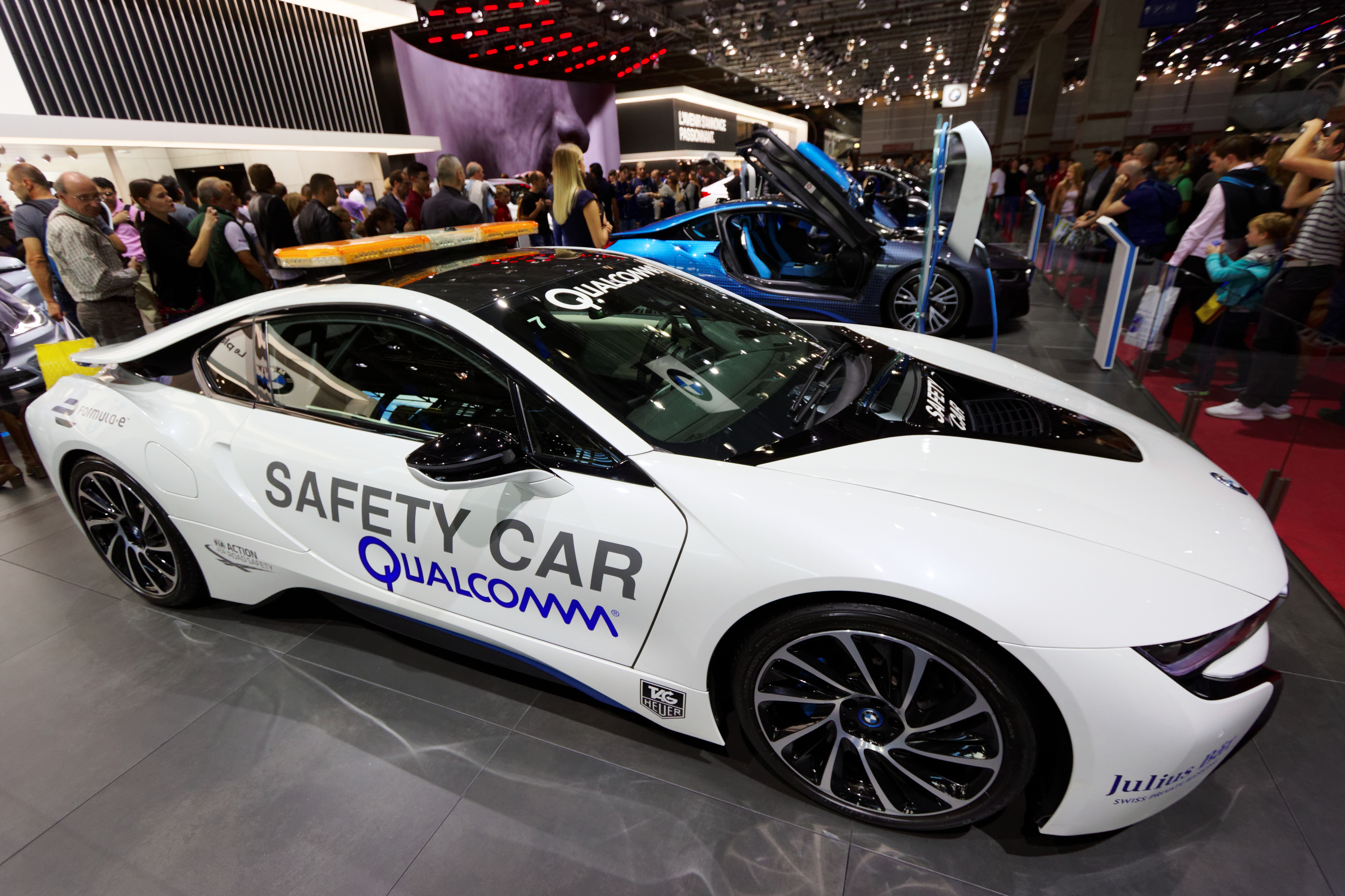 Une BMW i8 Safety car présentée lors du mondial de l'automobile de Paris 2016.